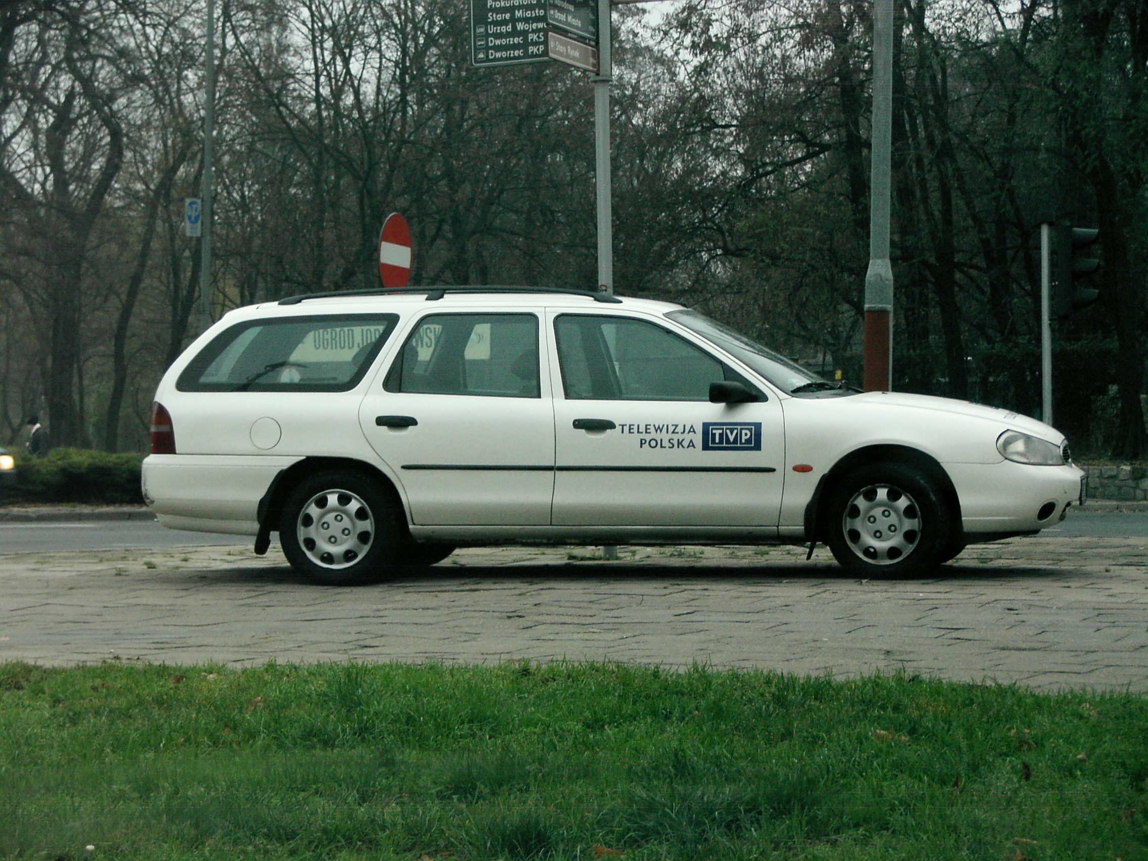 Osobowy wóz TVP oddział Poznań